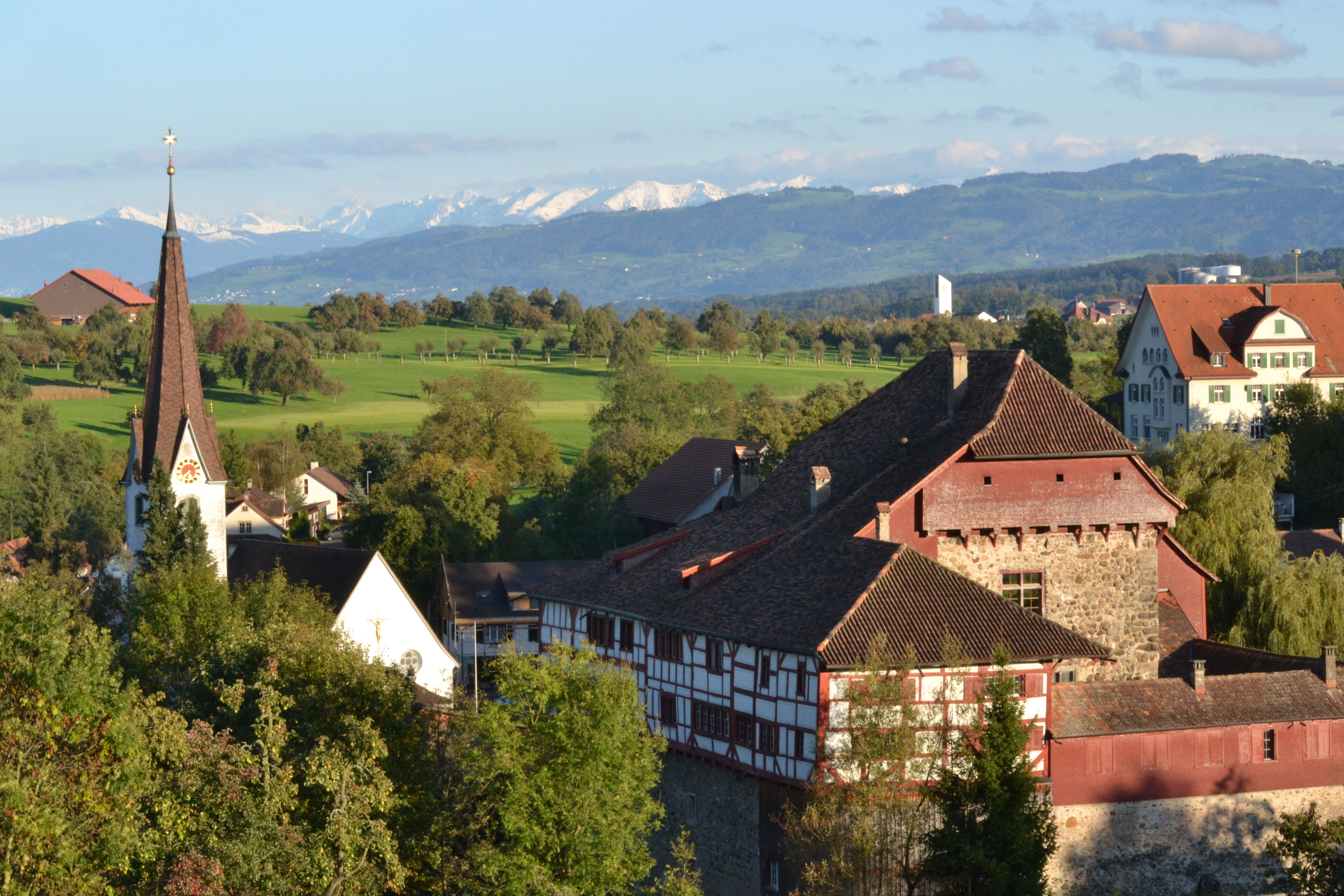 Wasserschloss Hagenwil bei Amriswil